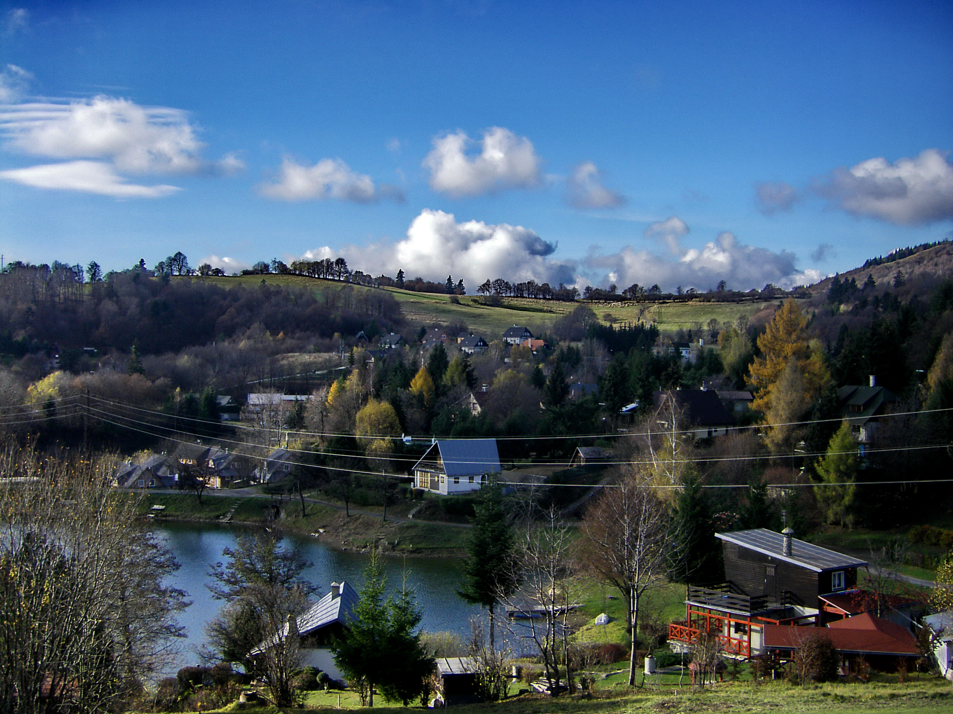 Nádrž vodná